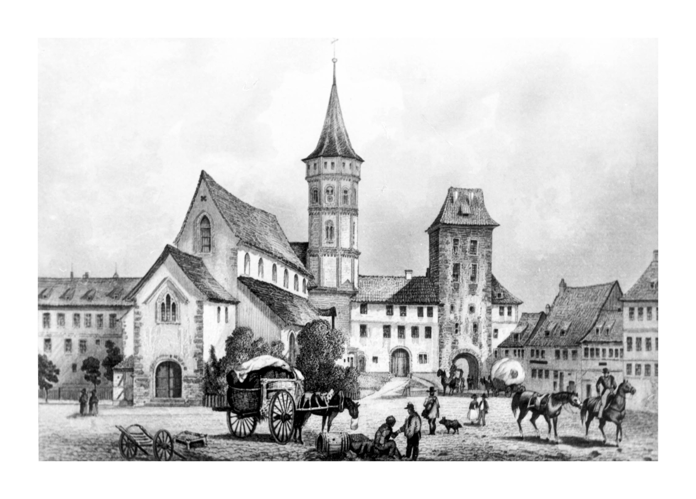 Eisenach - Nikolaitor und Nikolaikirche (eingescannte Kopie - Original ist coloriert)